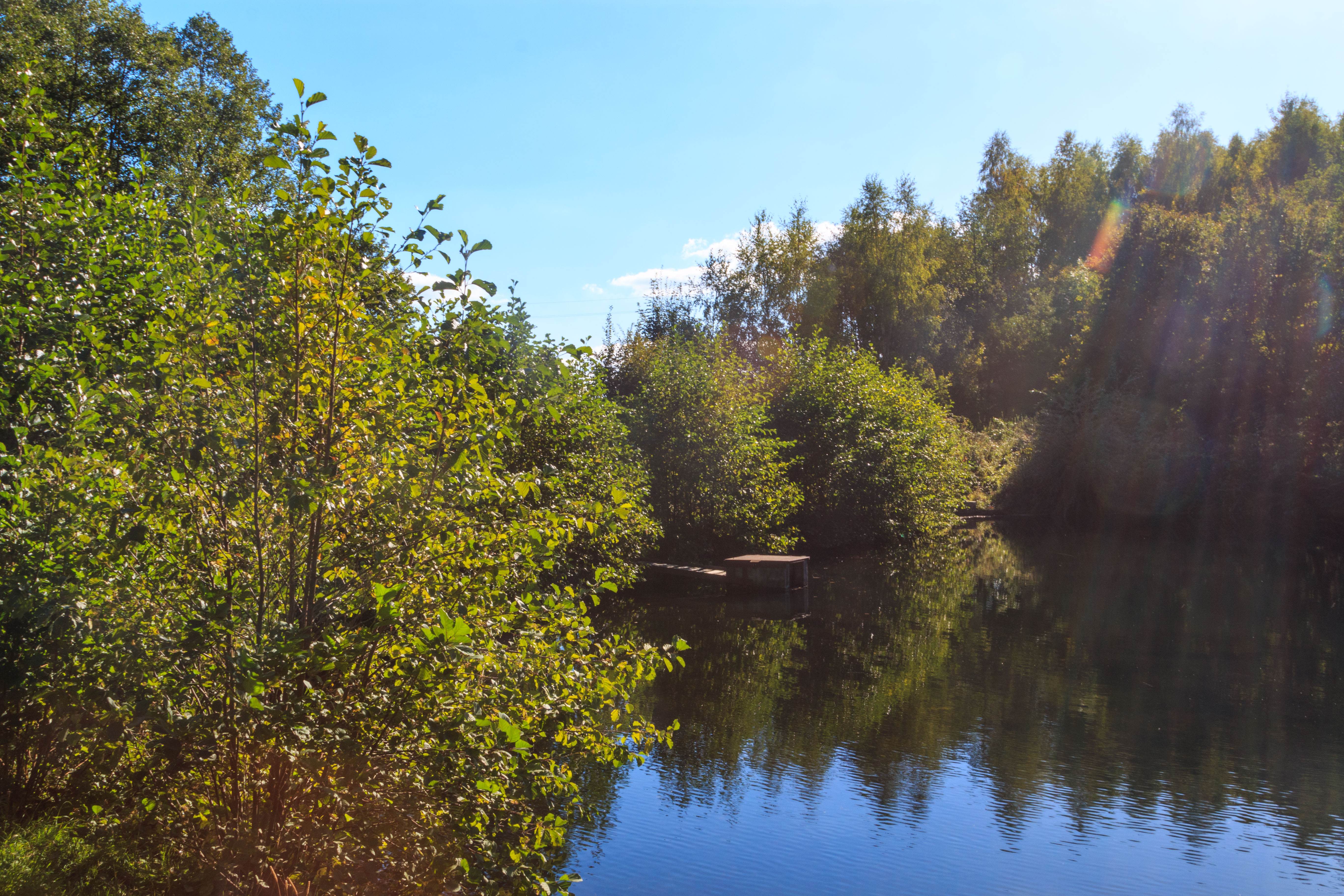 Horní Chotovický rybník Project: Vodstvo.